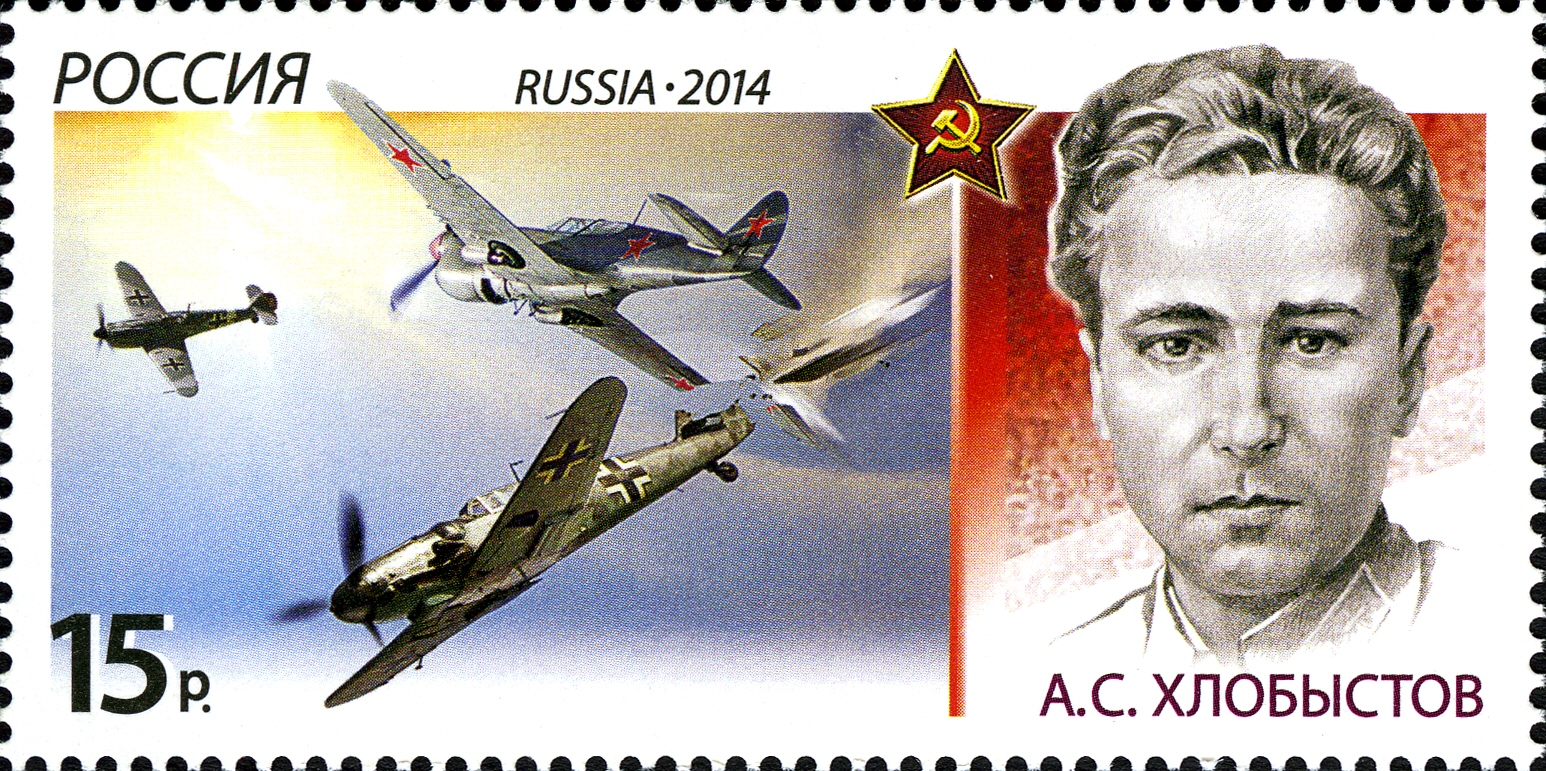 История авиации. Воздушные тараны (Алексей Степанович Хлобыстов